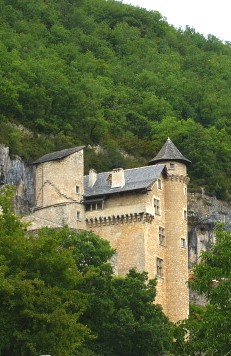 Eigen werk. Chateau de Larroque-Toirac In Lot-vallei, departement Lot, Frankrijk